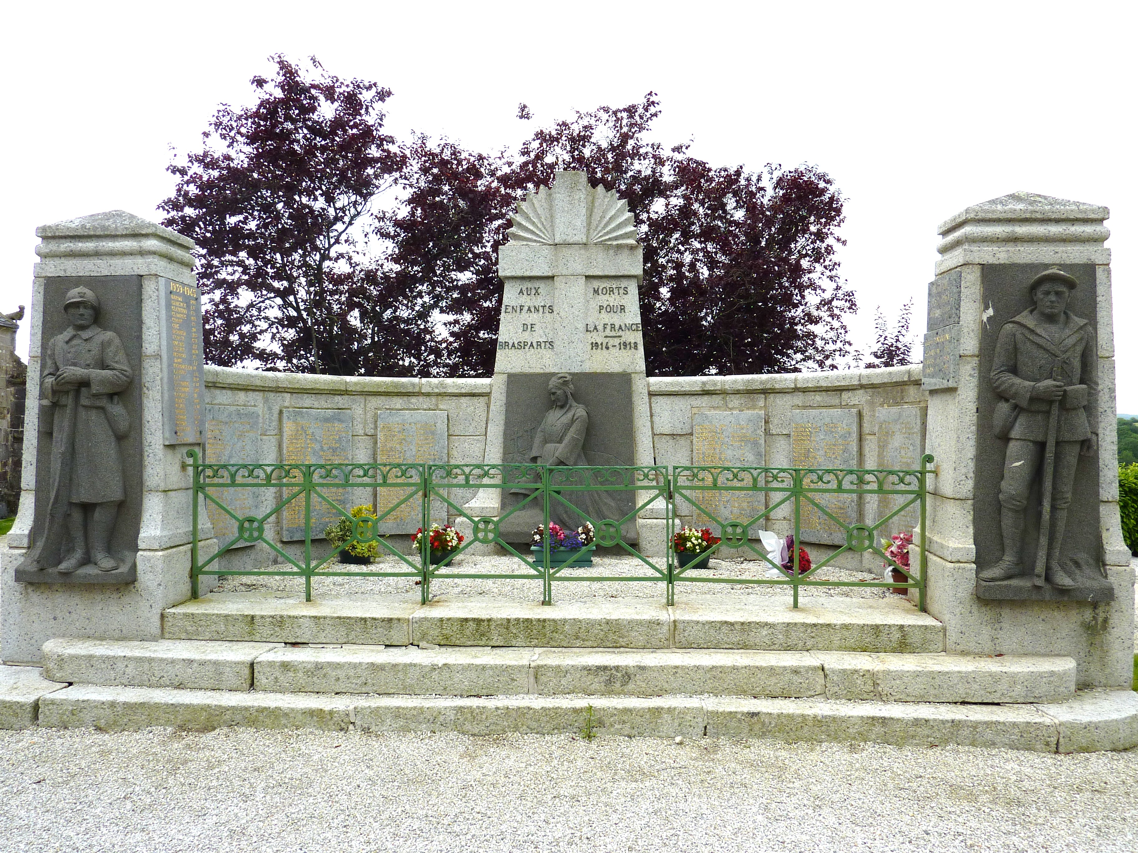 Le monument aux morts de Brasparts (Finistère)